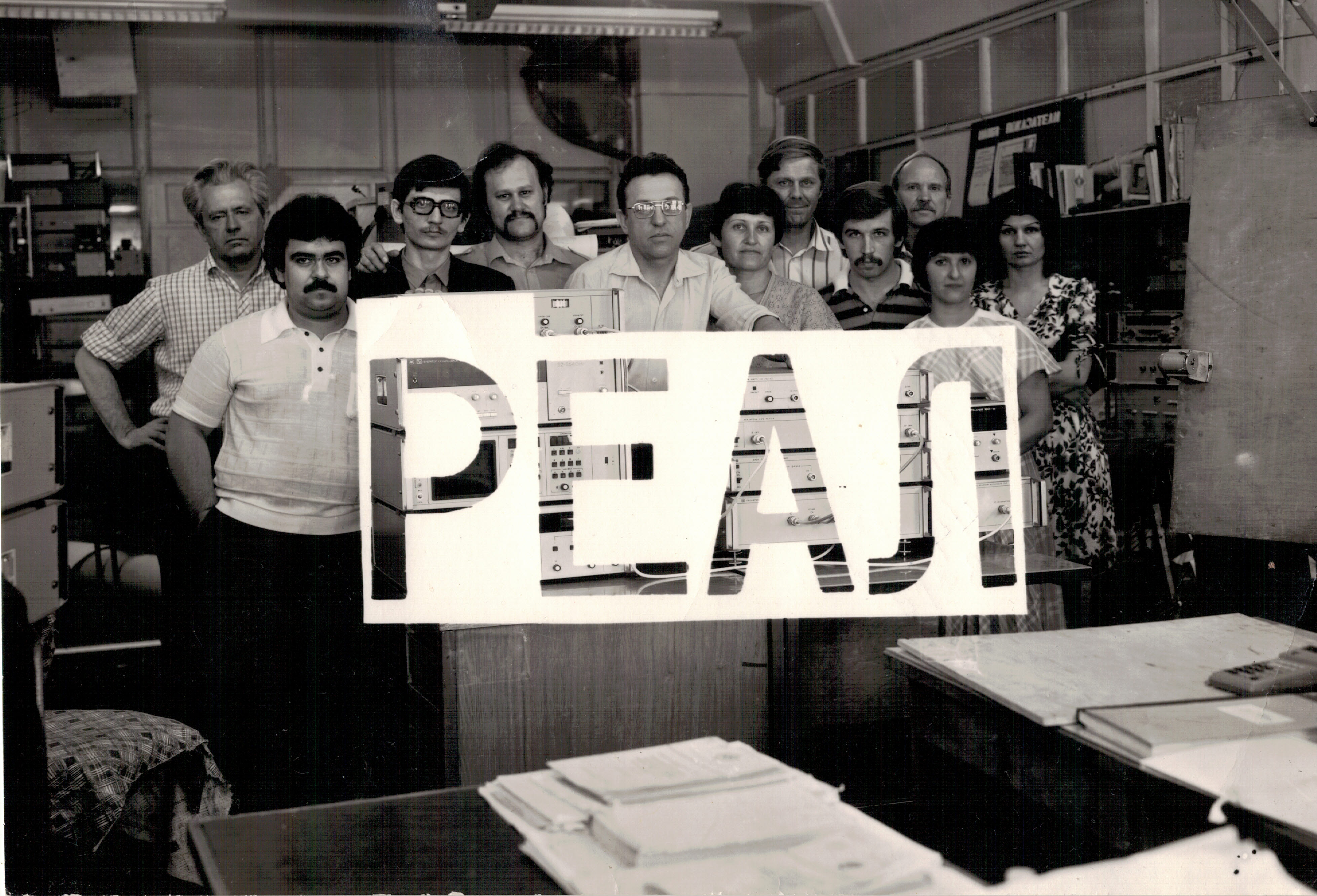 Приборный комплекс "Реал", КНИИ РИА Ритм, 1980-e годы